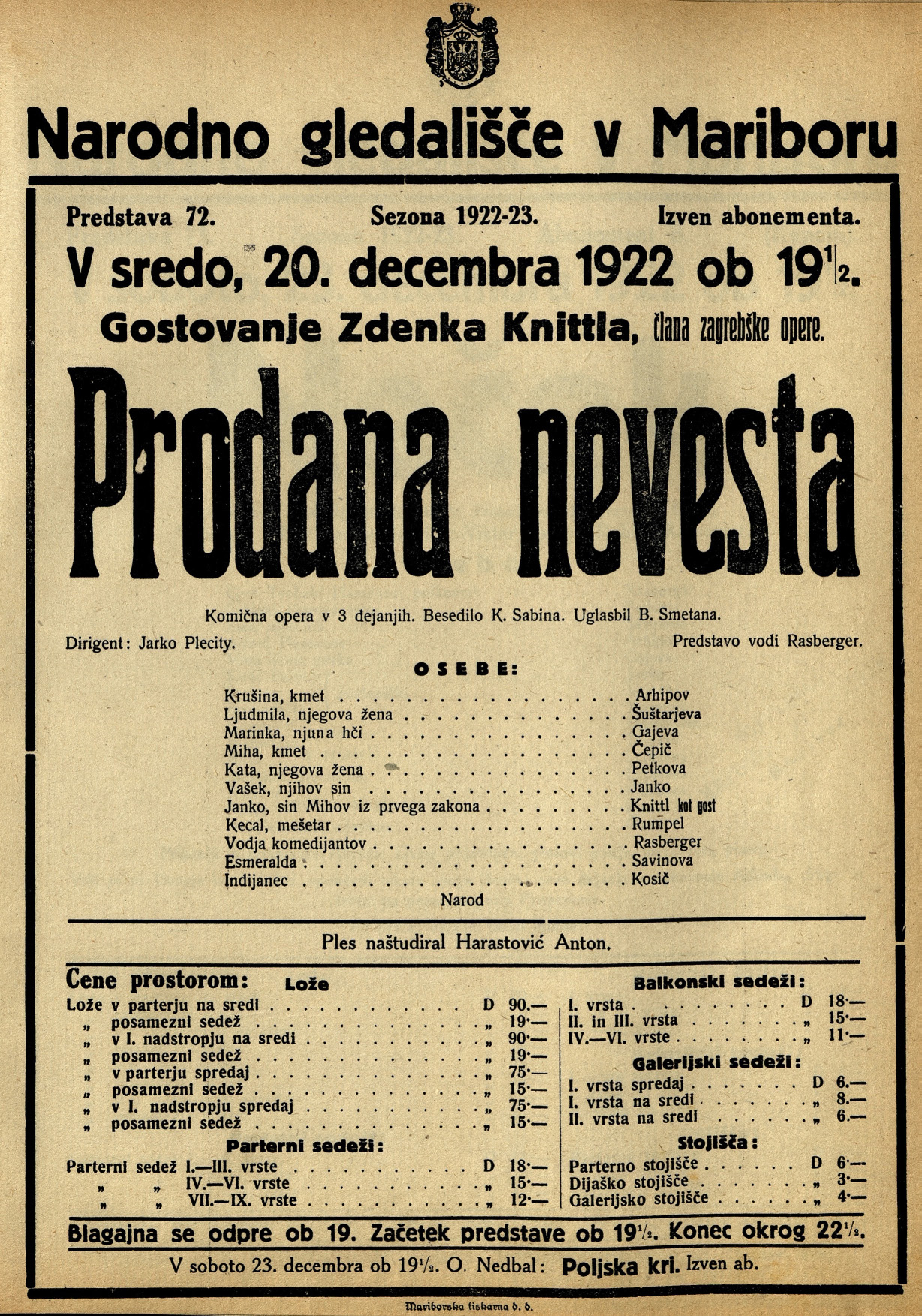 Plakat za predstavo Prodana nevesta v Narodnem gledališču v Mariboru.